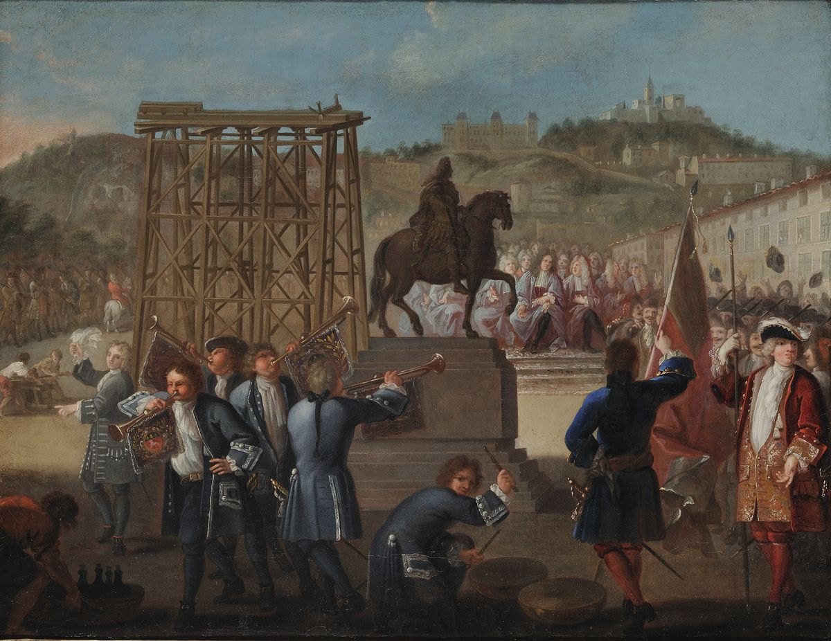 Inauguration de la statue de Louis XIV par Desjardins, de Charles Grandon (1691 - 1762)